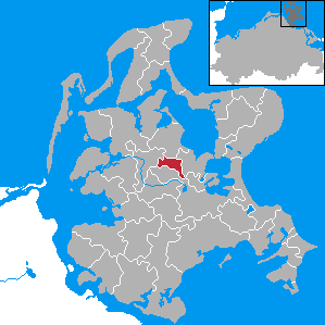 Patzig, Landkreis Rügen, Mecklenburg-Vorpommern